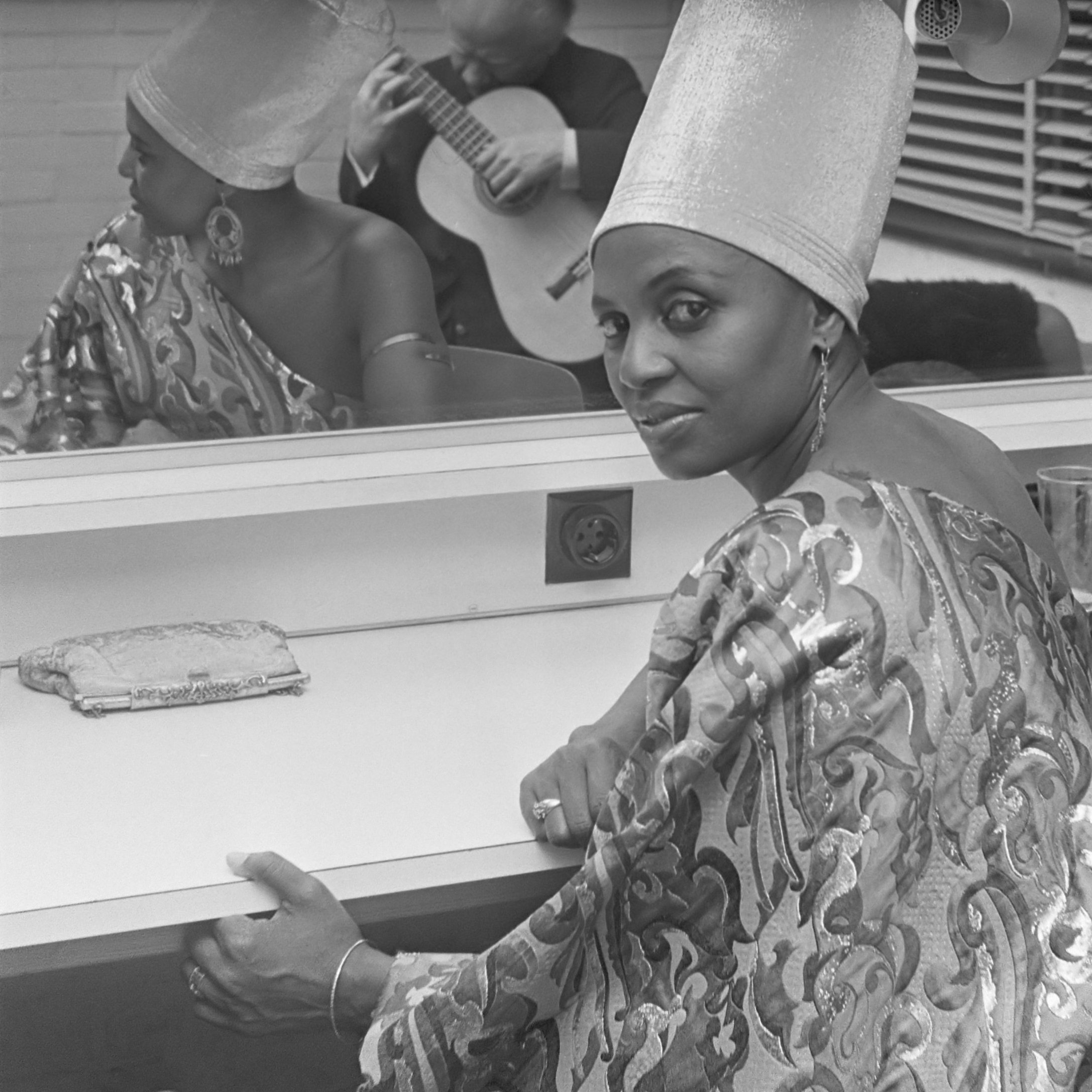 Grand Gala du Disque Populaire in Congrescentrum. Miriam Makeba